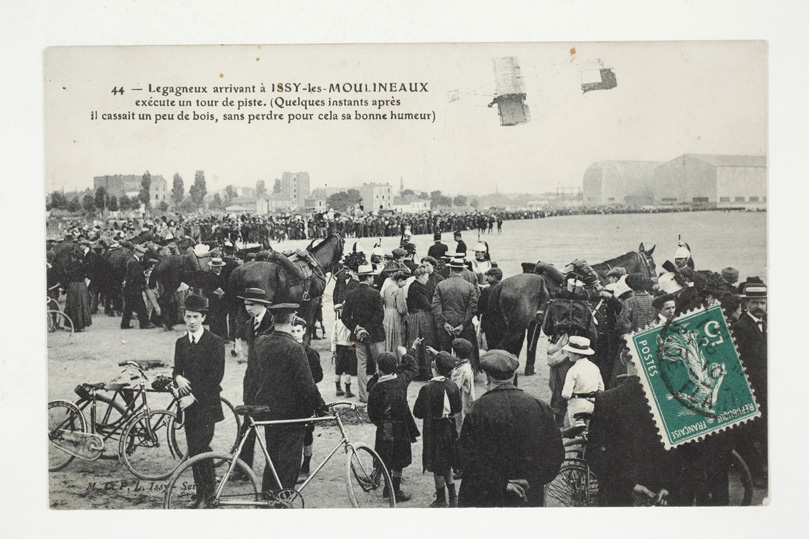 Legagneux arrivant à Issy-les-Moulineaux exécute un tour de piste. (Quelques instants après il cassait un peu de bois, sans perdre ppur cela sa bonne humeur) Au fond, des hangars à dirigeables Éditeur: M.C.F.L Issy-Seine Adresse actuelle : 8 boulevard des frères Voisin Date : 1917